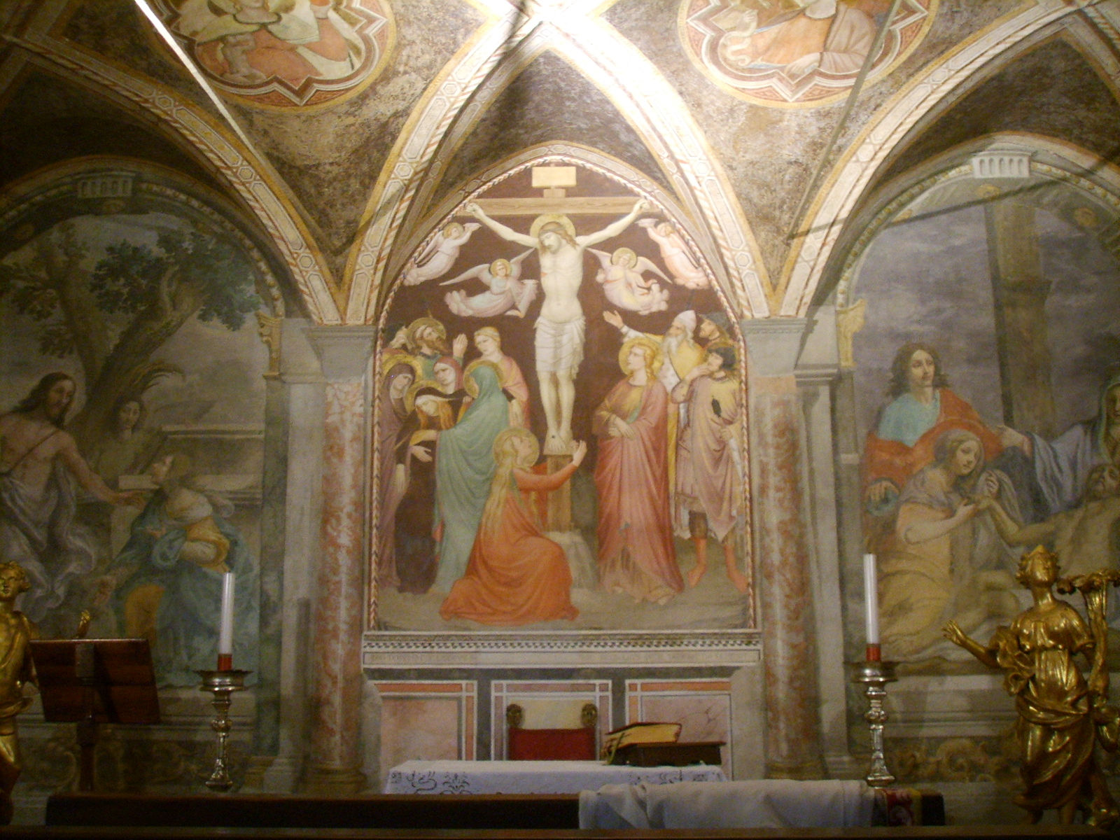 Santa_Felicita, sala_capitolare frescos Niccolò_di_Pietro_Gerini_e__cosimo_ulivelli church in Florence